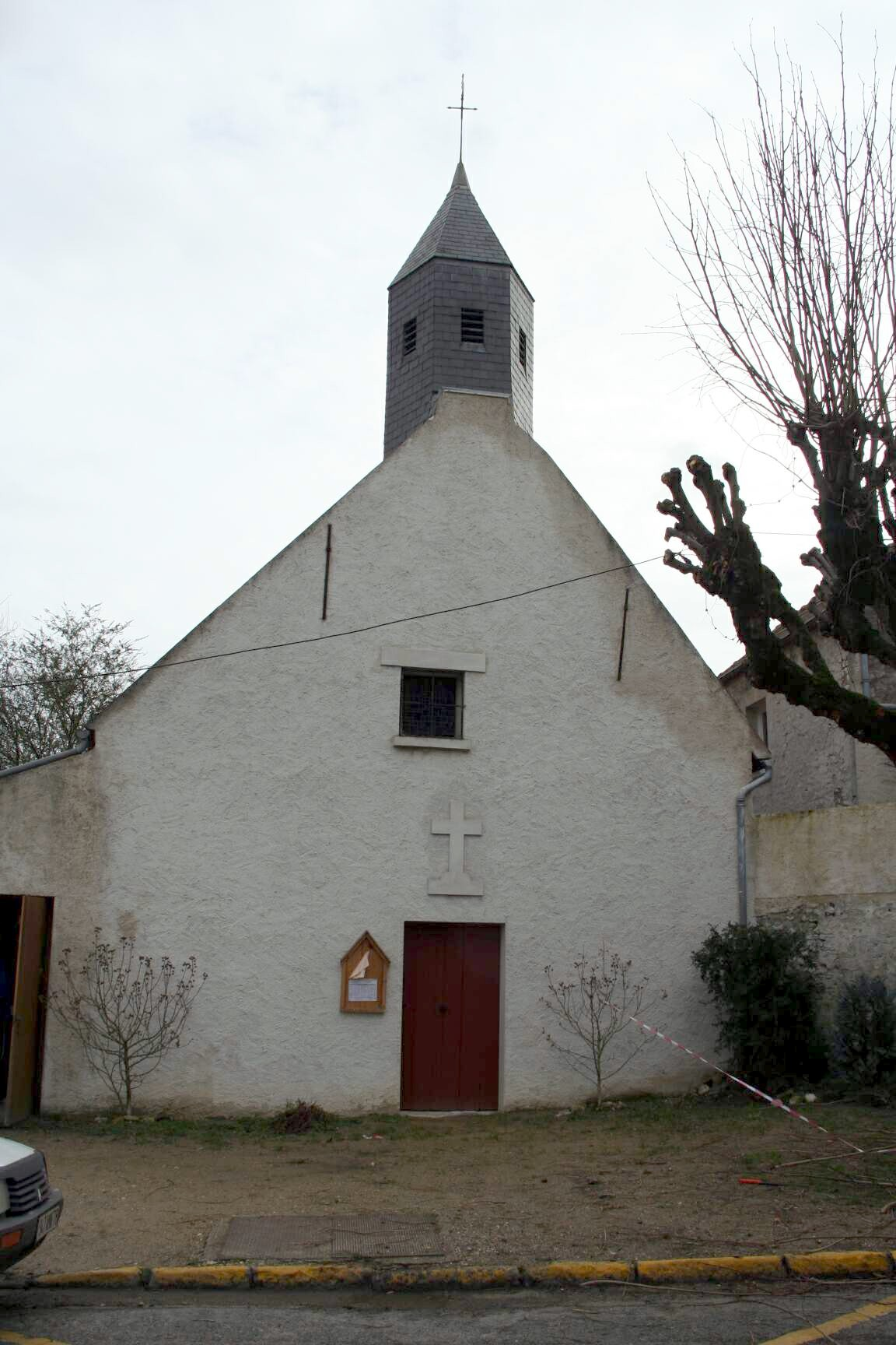 Chapelle de Sandrancourt, commune de Saint-Martin-la-Garenne - Yvelines (France)